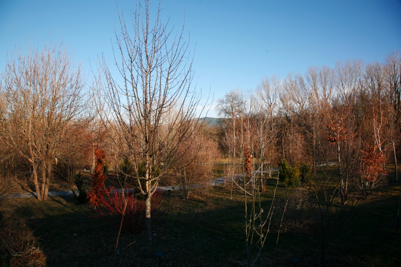 Arboreto Giner de los Ríos, Rascafría (Madrid)